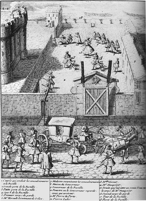 Gravure représentant l'embastillement des convulsionnaires